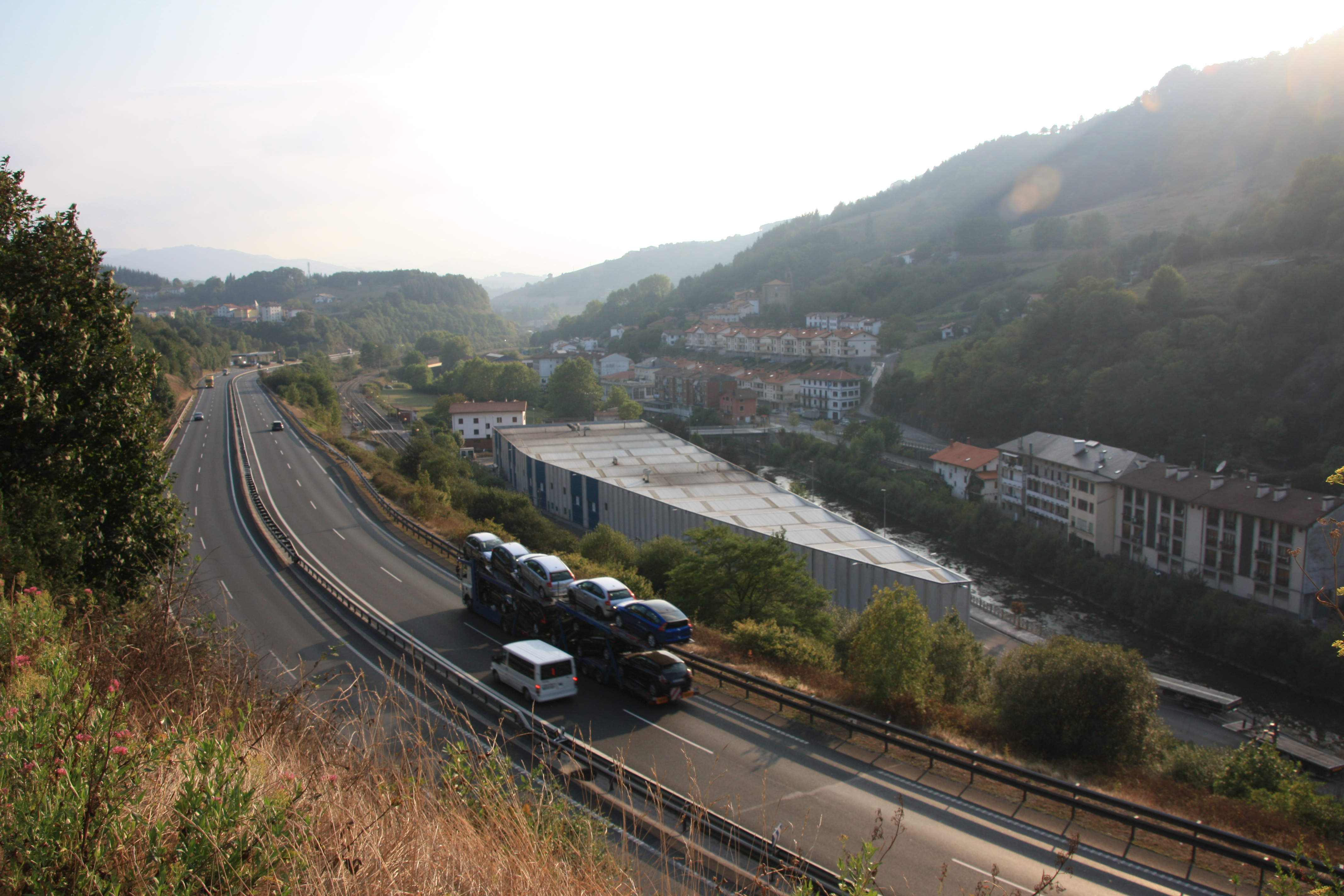 Itsasondoren ikuspegia.